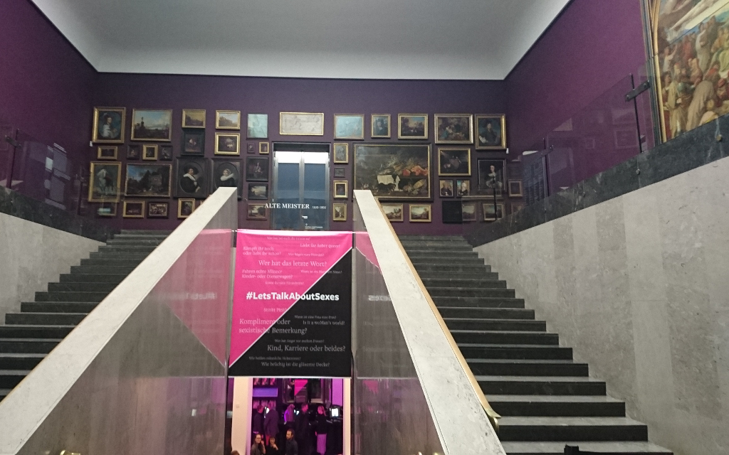 Treppenhaus im Eingangsberreich des Städel, Blick auf verschiedene alte Meister und das für die Stereonight illuminierte Foyer